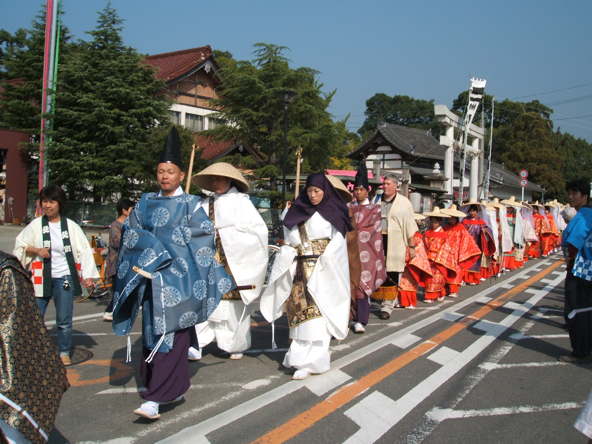 湯浅大宮顯國神社（和歌山県有田郡湯浅町）の例大祭、町内から20数基の神輿が奉納され、平安衣装を着た行列で魅了します。